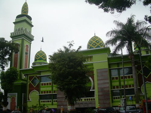 Gedung perkuliahan Kampus 1 IAIN Salatiga.